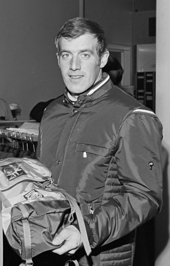 Magne Myrmo